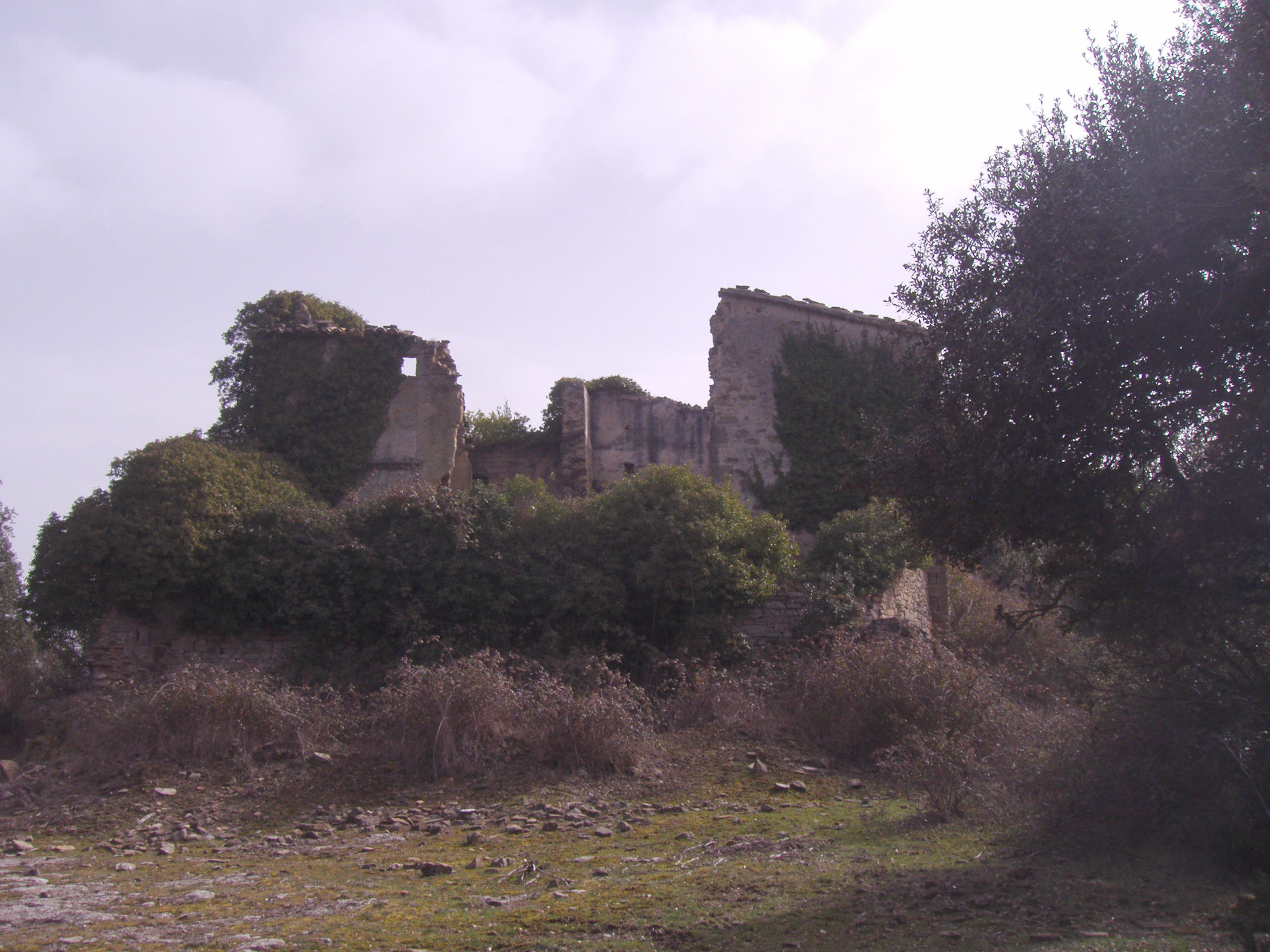 Vista de la part oposada a la façana.